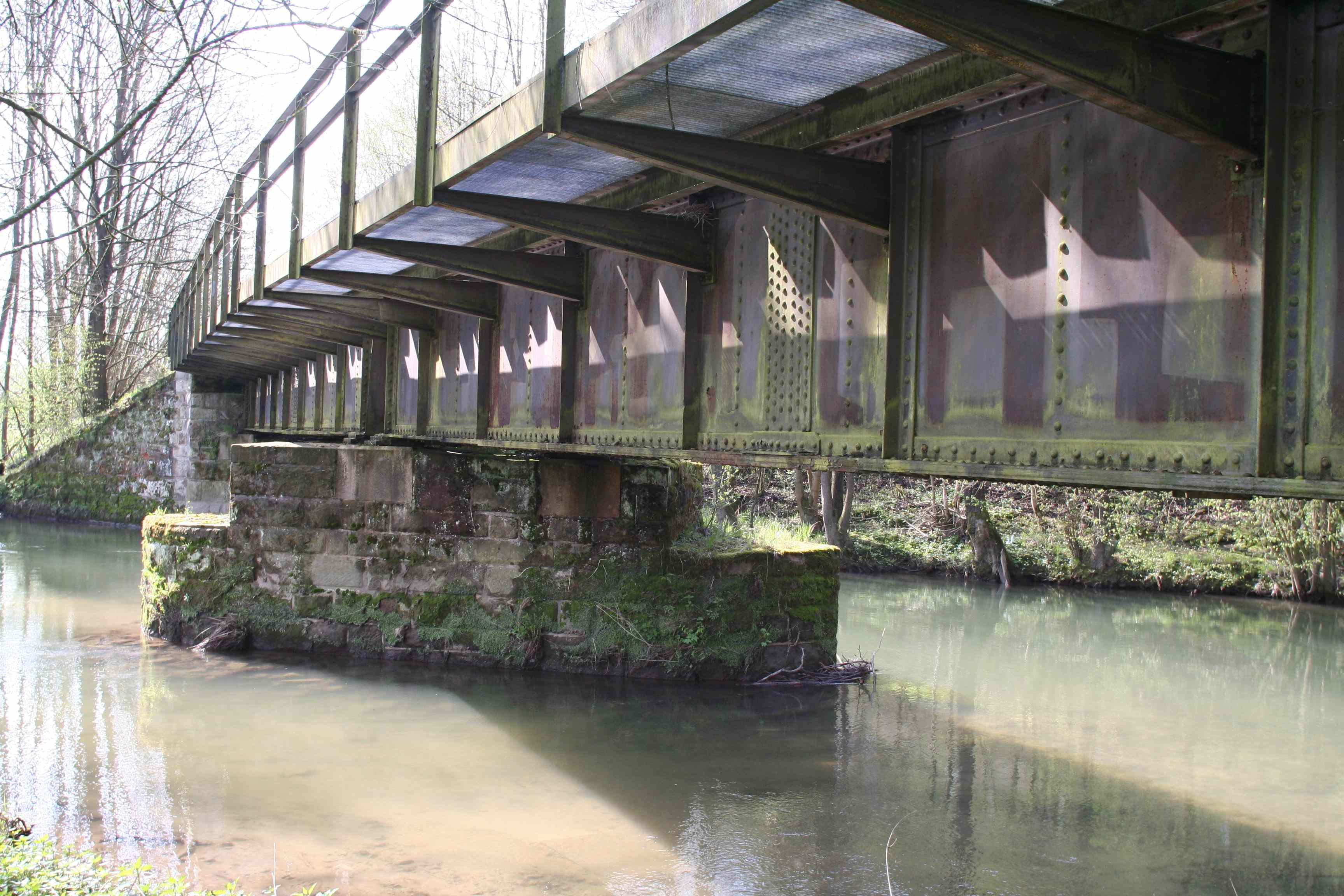 Brücke der Steinachtalbahn, ehemalige Eisenbahnbrücke der Steinachtalbahn bei Leutendorf im Landkreis Kronach